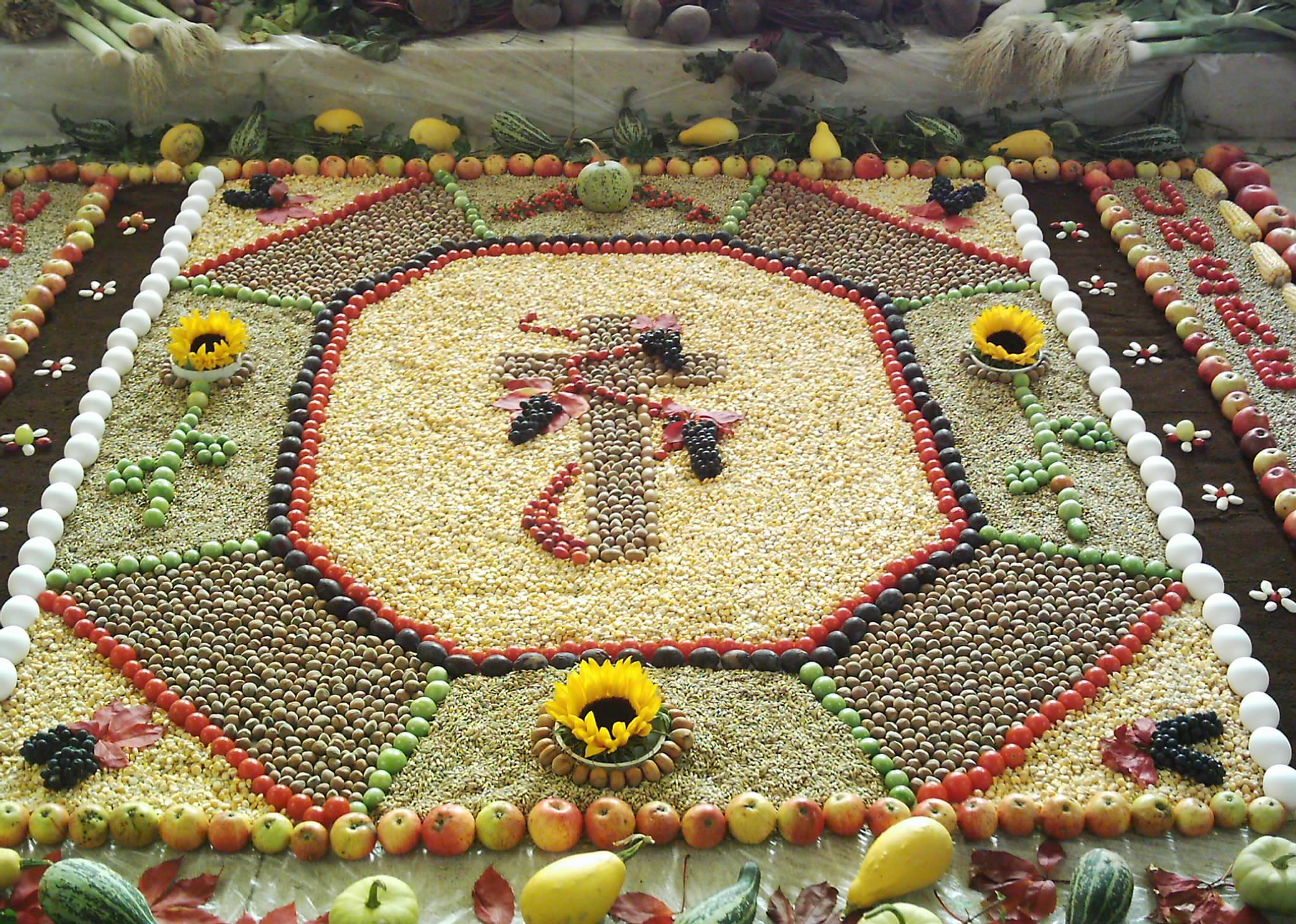 Erntedankteppich, Pfarrkirche St. Johann Baptist, Treherz, Gemeinde Aitrach, Landkreis Ravensburg